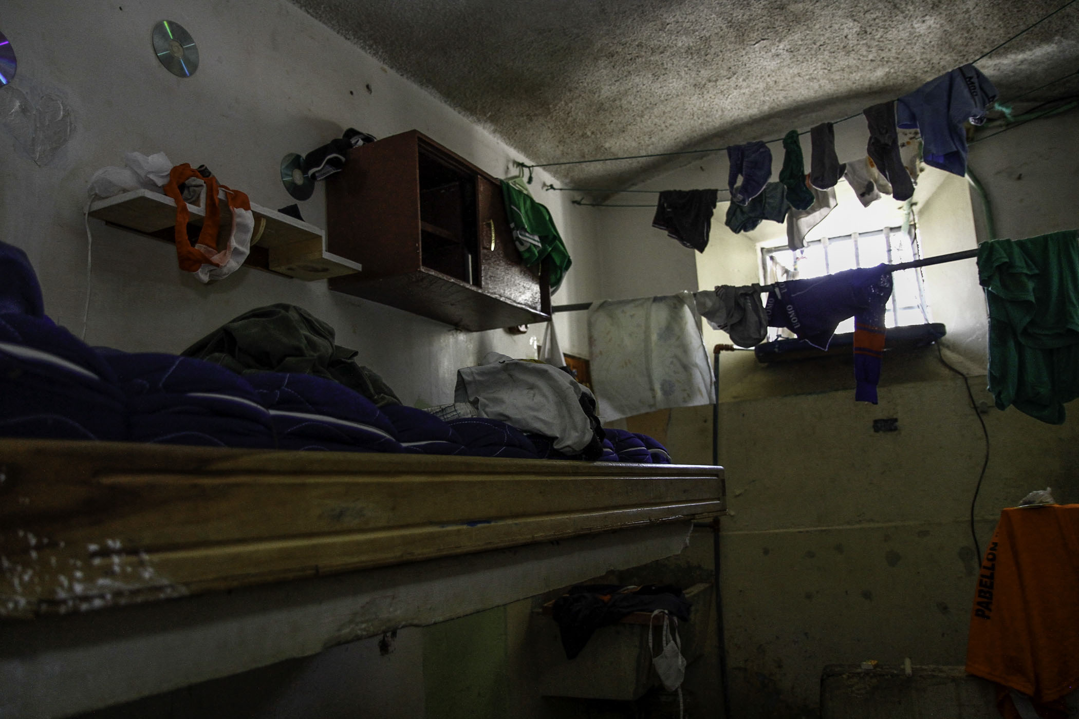 Quito, Ecuador, 20 dic (ANDES).- El Ministerio de Justicia, Derechos Humanos y Cultos presentó la exposición fotográfica "Espacios Verdes" cuyo escenario es el ex-Penal García Moreno. Esta exposición devela lo que dejaron las personas privadas de la libertad antes del cierre de este recinto carcelario. Foto: Micaela Ayala V./ANDES